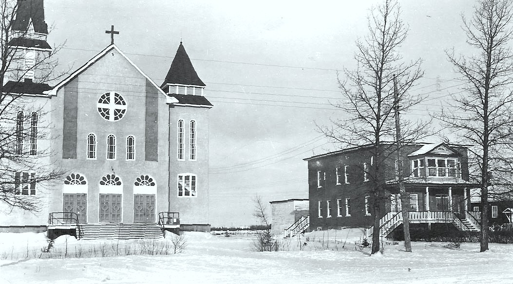 Eglise et presbytère de La Reine (Québec)